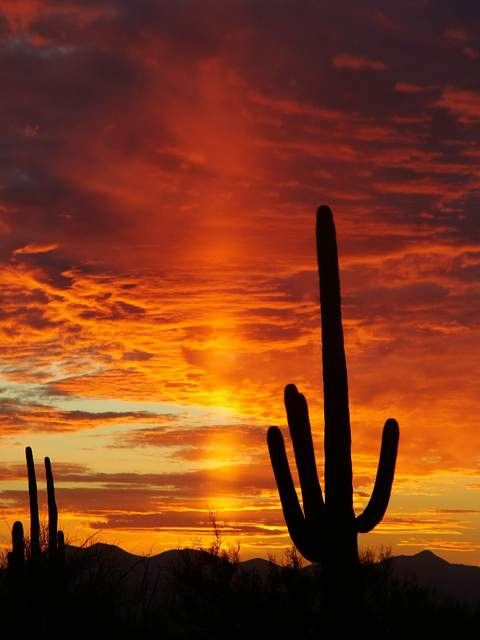 Sunset in Tucson desert